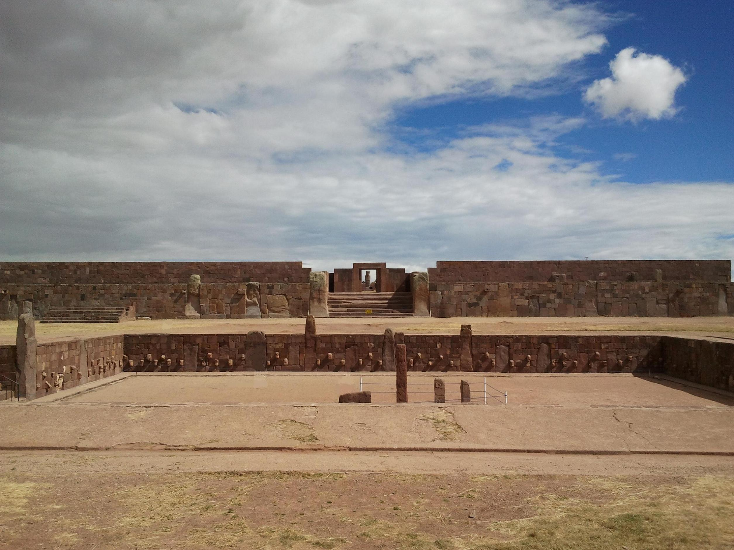 Temple souterrain